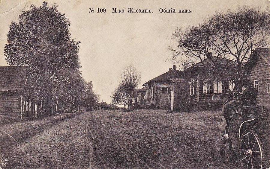 Беларуская (тарашкевіца): Жлобін